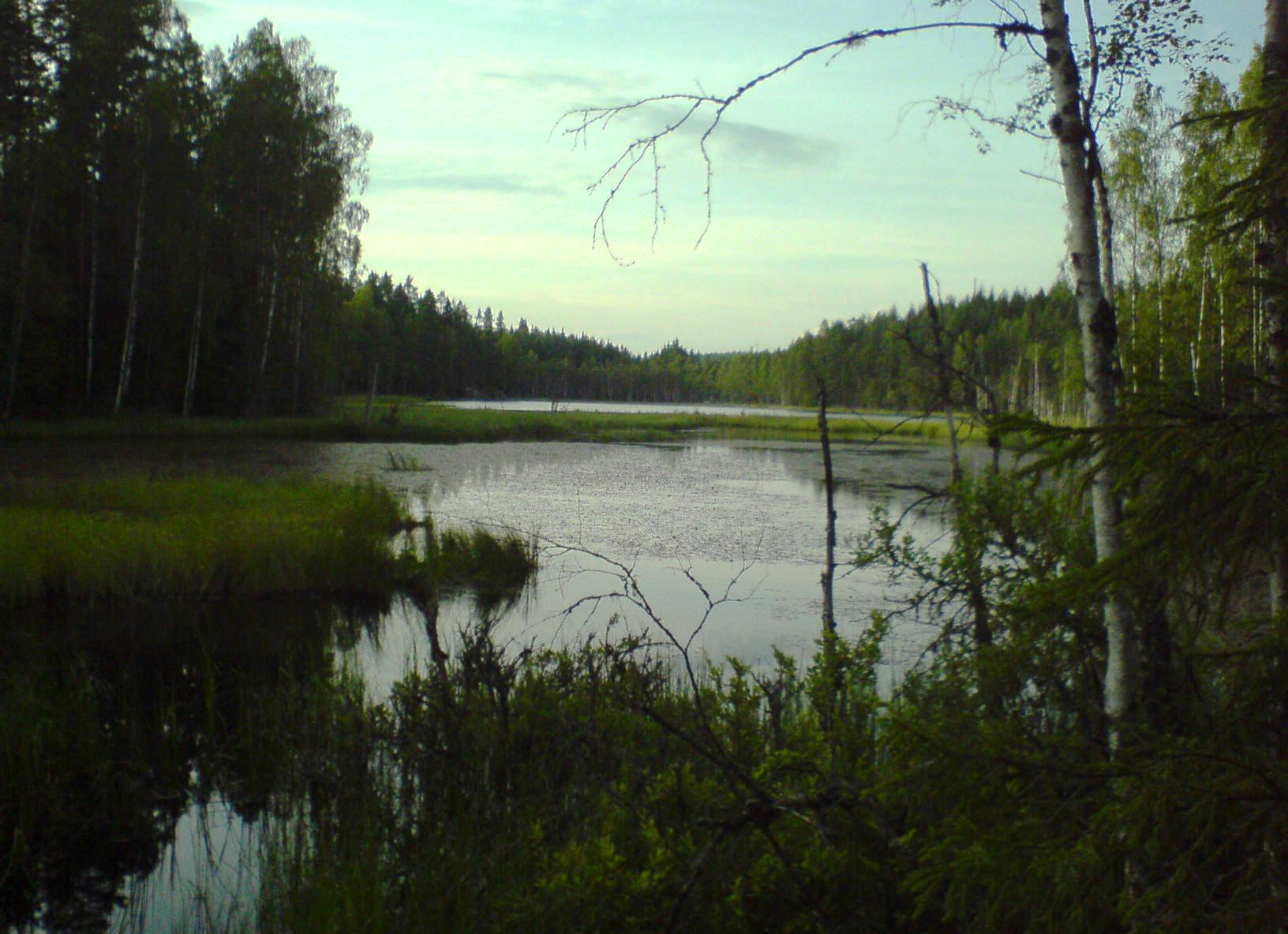 Abbortjern på Lierfoss i Aurskog-Høland kommune.